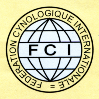 part of a diploma from a dog show - FCI logo